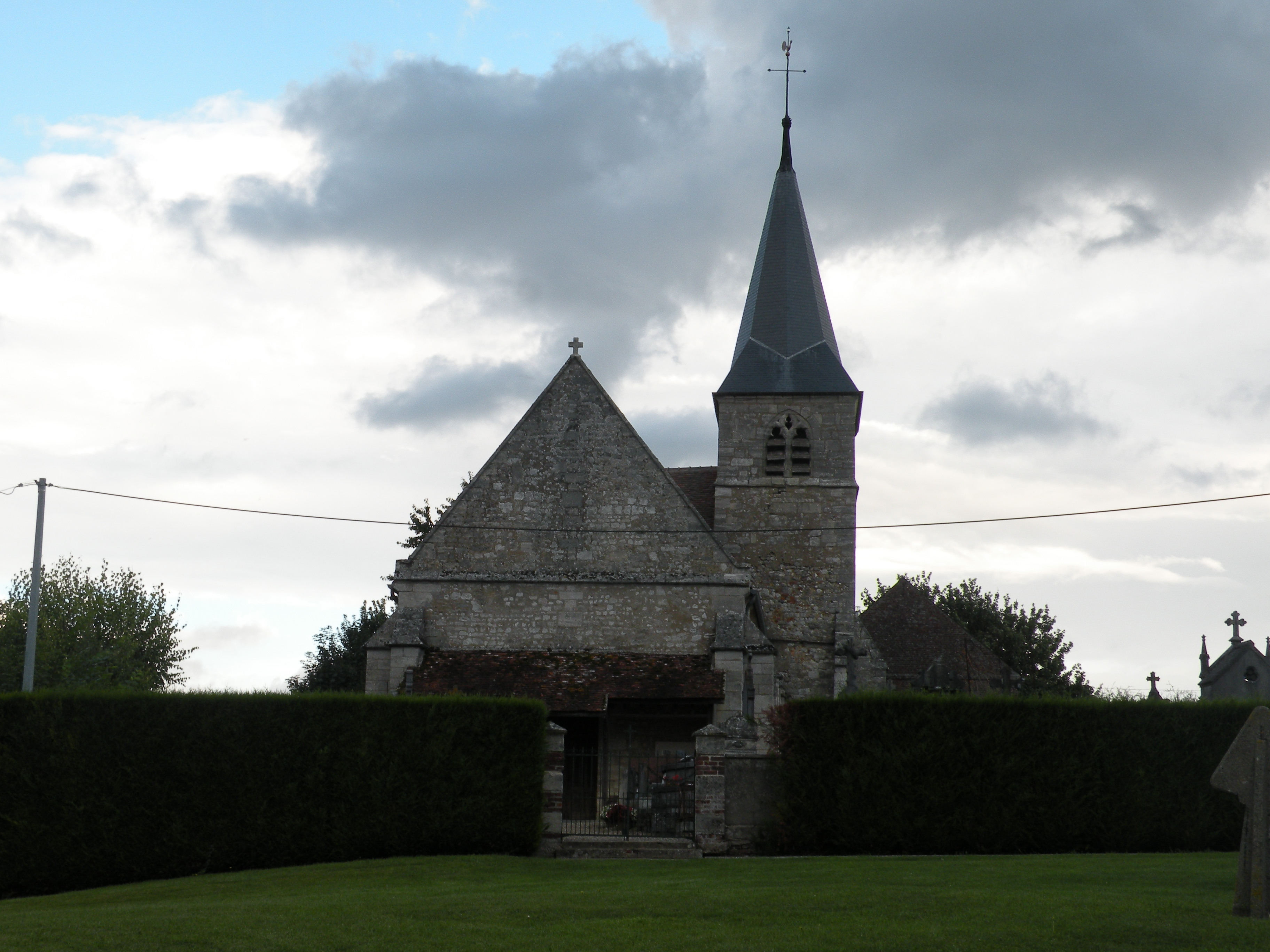 église d'Hodenc-l'Évêque